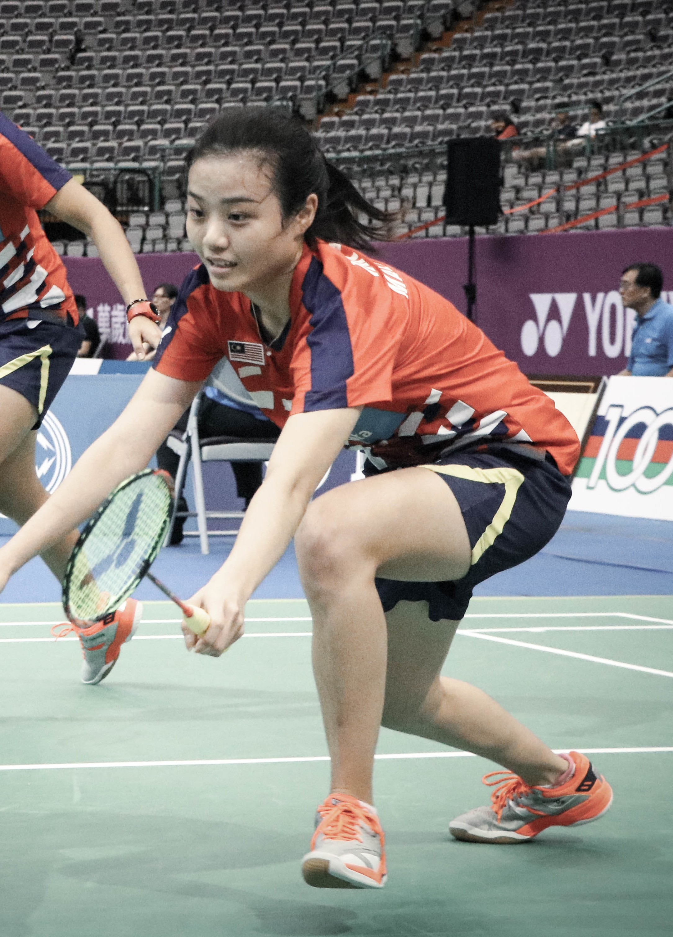 2018 台北OPEN 10/03